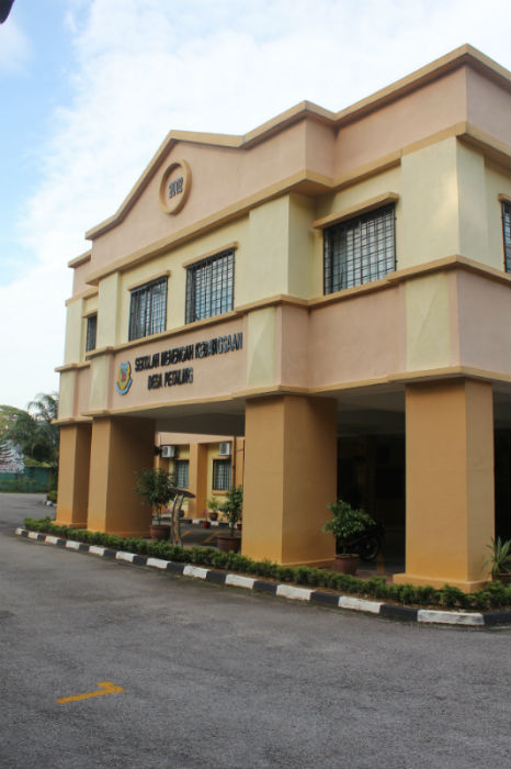 Panorama SMKDP